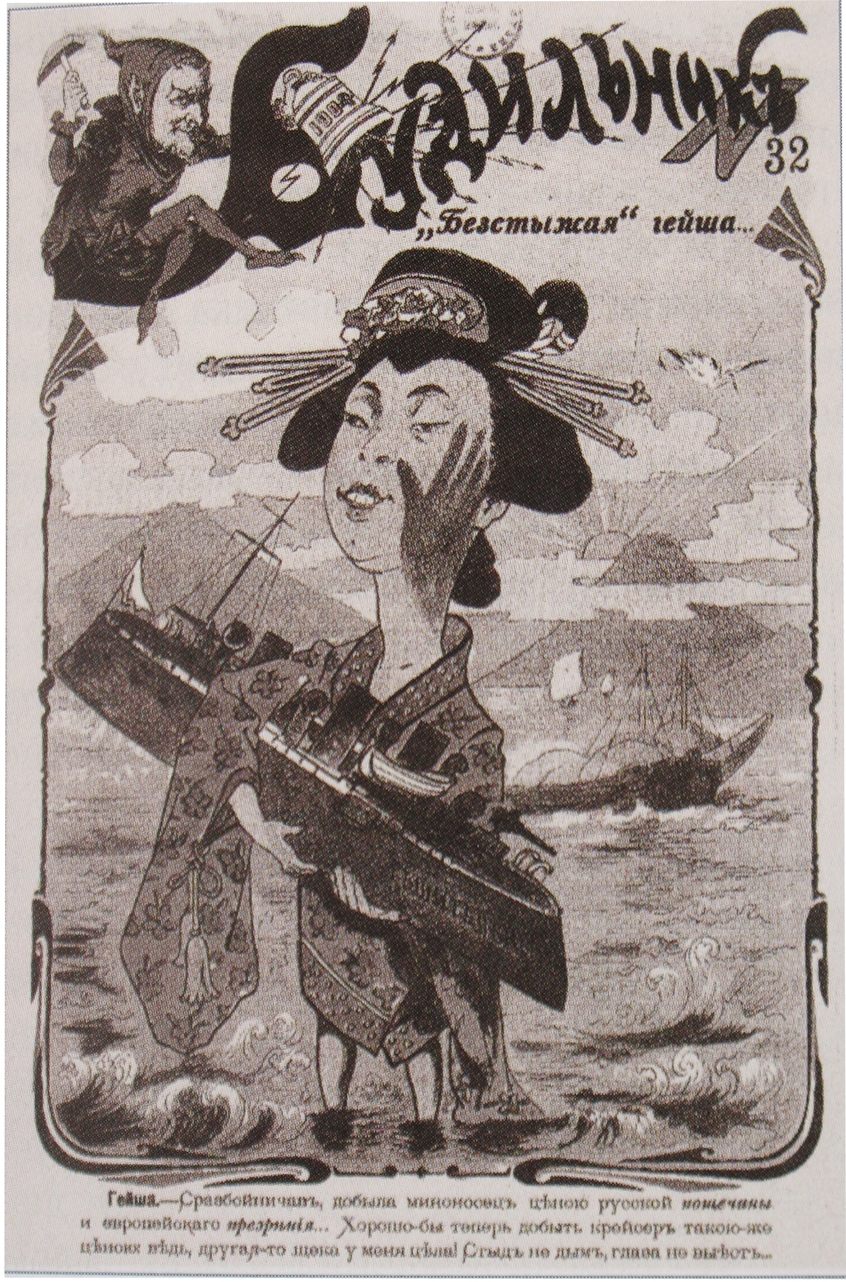 Журнал "Будильник" (Россия) № 32-1904. "Безстыжая гейша" держит в руках русский миноносец "Решительный", захваченный в нейтральном порту. Русско-японская война.